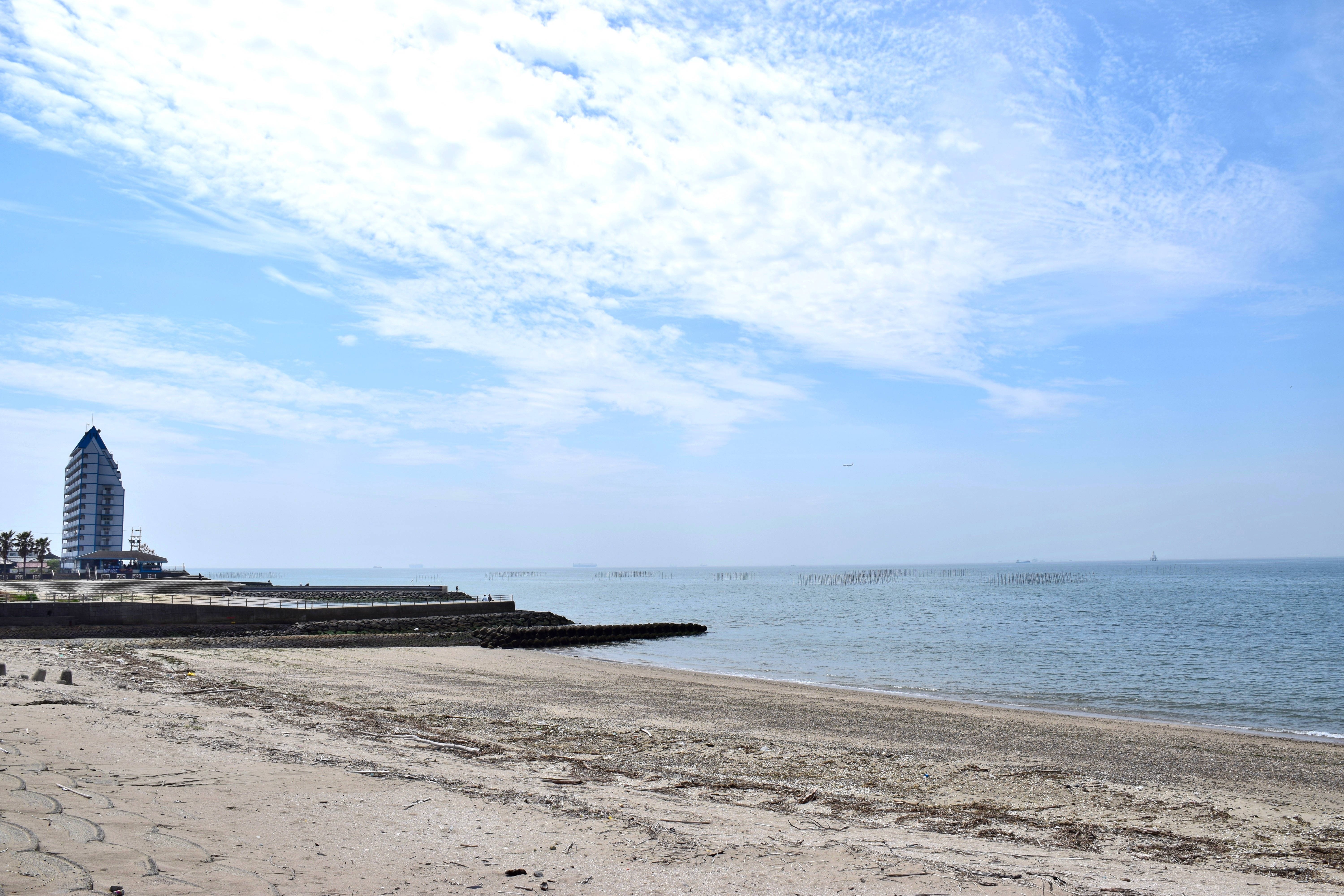 愛知県常滑市にある大野海水浴場（大野海岸）。世界最古の海水浴場とされることがある。